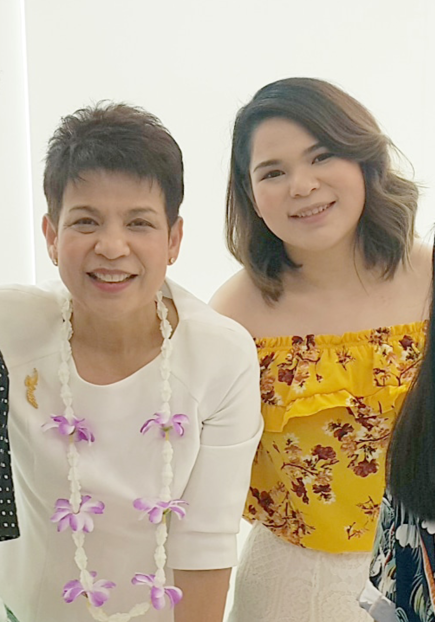 อุไรวรรณ ศิวะกุล (ซ้าย) และ อธิปพร ศิวะกุล ในวันสงกรานต์ พ.ศ. 2561